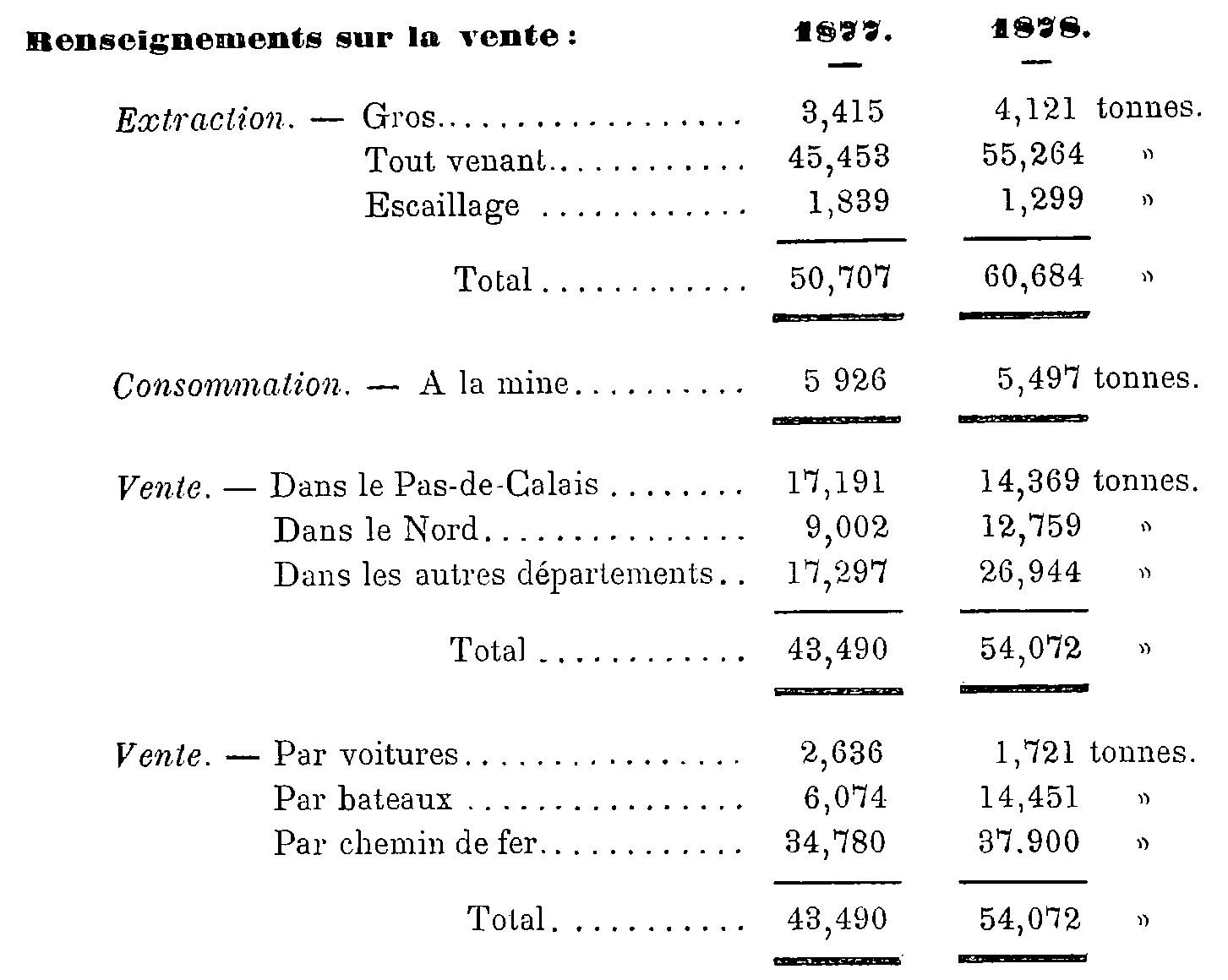 Renseignement sur la vente en 1877 et 1878 des produits de la Compagnie des mines de Vendin.